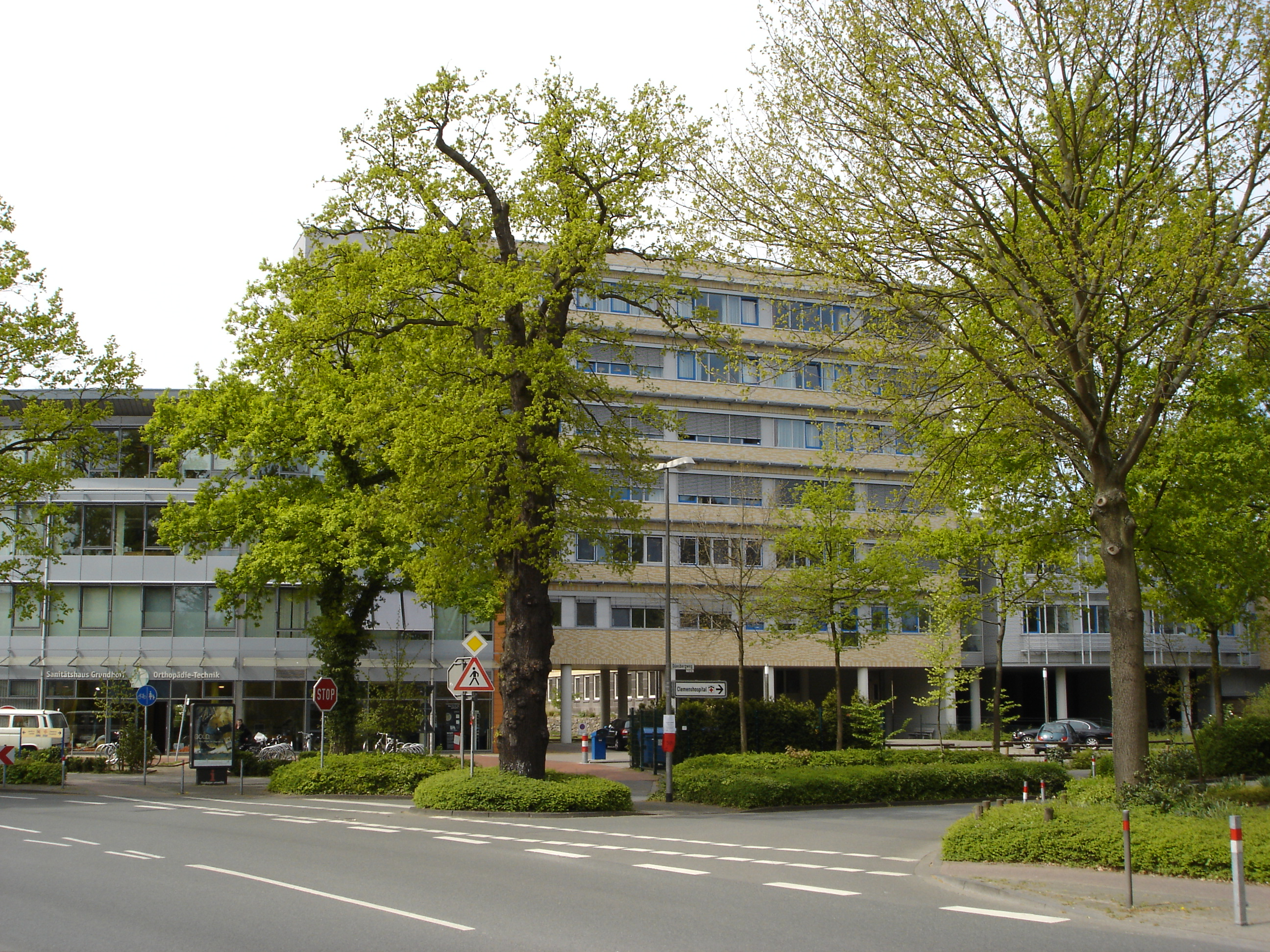 Blick von Südost auf das Clemenshospital in Münster